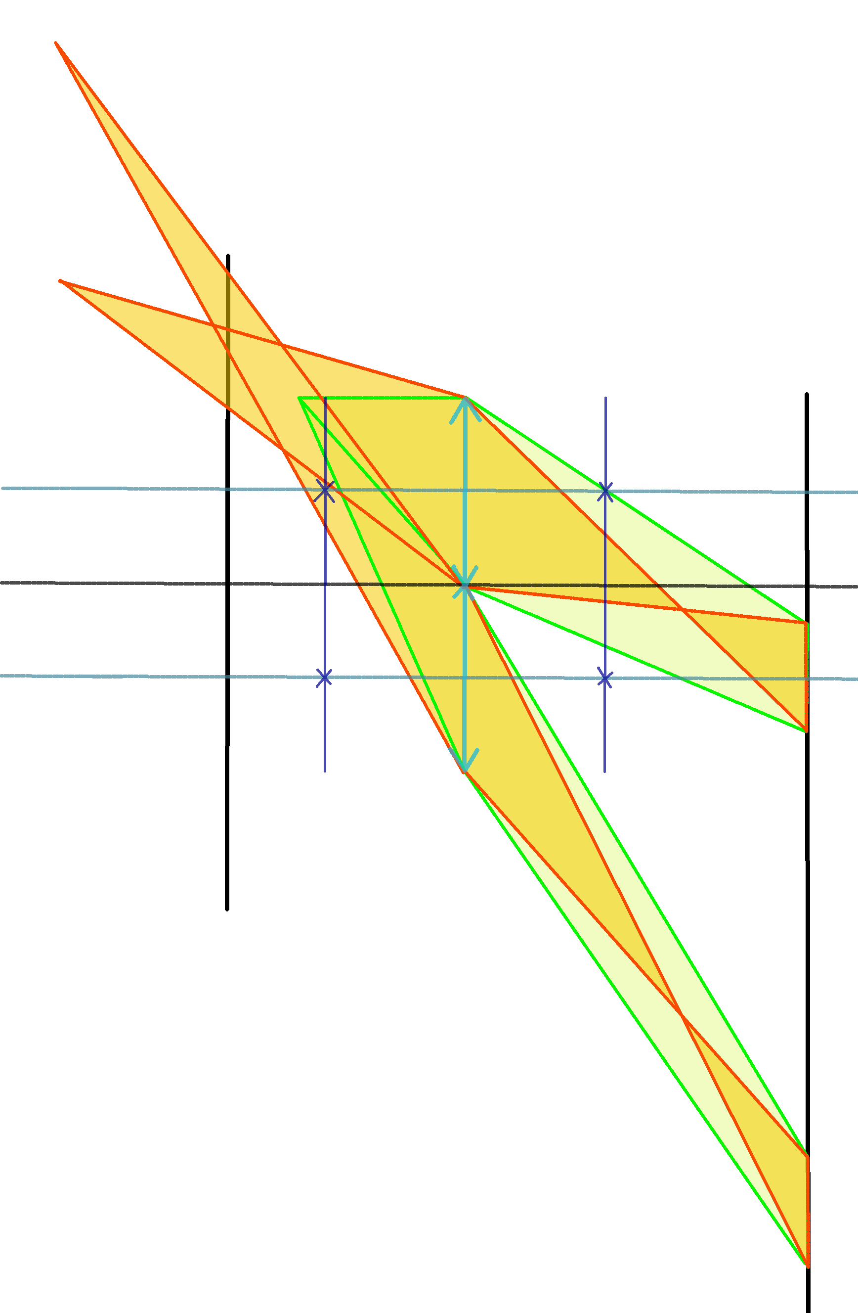 Considérons l'image d'une source ponctuelle donnée par l'objectif. Cette image est l'objet des lentilles télémétriques. Les capteurs CCD peuvent détecter une différence de phase mais aussi la largeur des faisceaux. L'objet est formé après le capteur principal et donne une image après les capteurs CCD. Si on cherche une source ponctuelle avec la même largeur de faisceau et la même différence de phase, cela nous donne deux sources ponctuelles ce qui est absurde. L'injectivité de la fonction donnant la différence de phase est donc assurée.